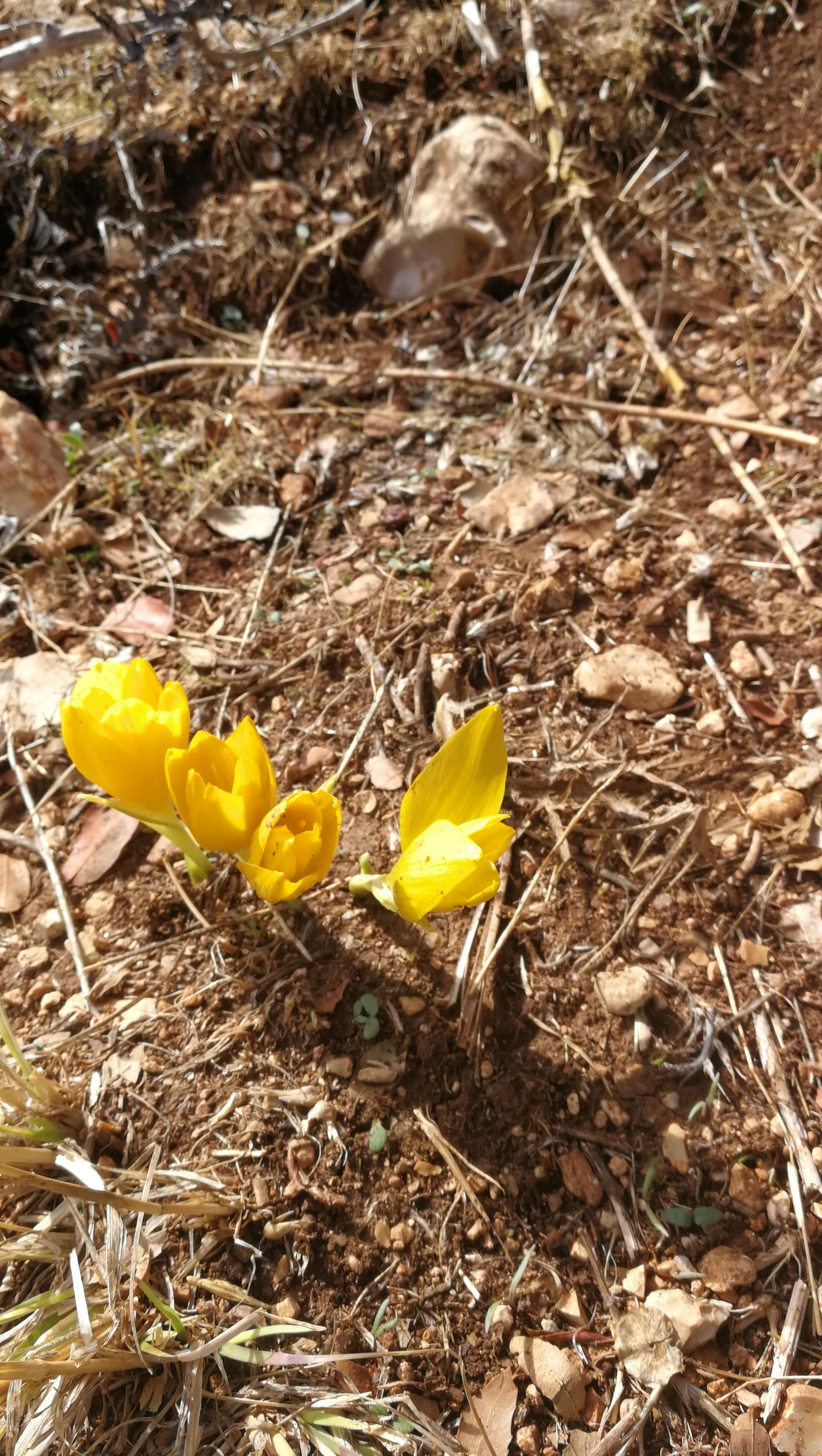 פריחת החלמוניות בהר מירון